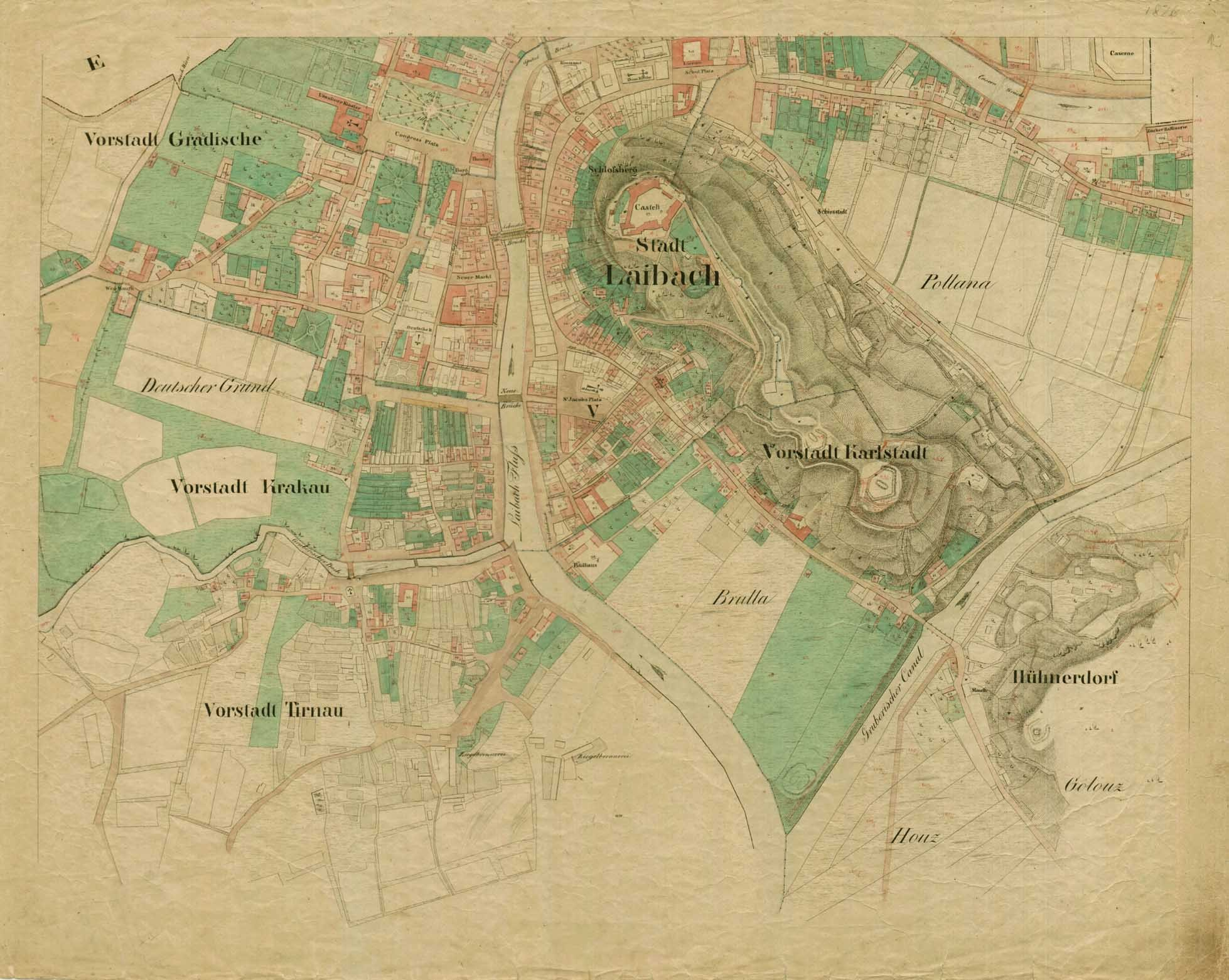 historische Vermessungskarte: franziszeischer Kataster, Stadt Laibach. Slowenien. 1826 (laut handschriftlichem Vermerk rechts oben).